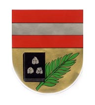 Wappen von Bickenbach (Hunsrück)